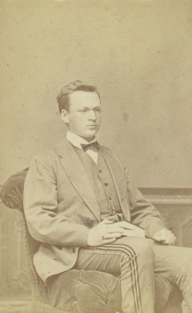 Porträtfotografie von Arnold Busson (1844–1892)